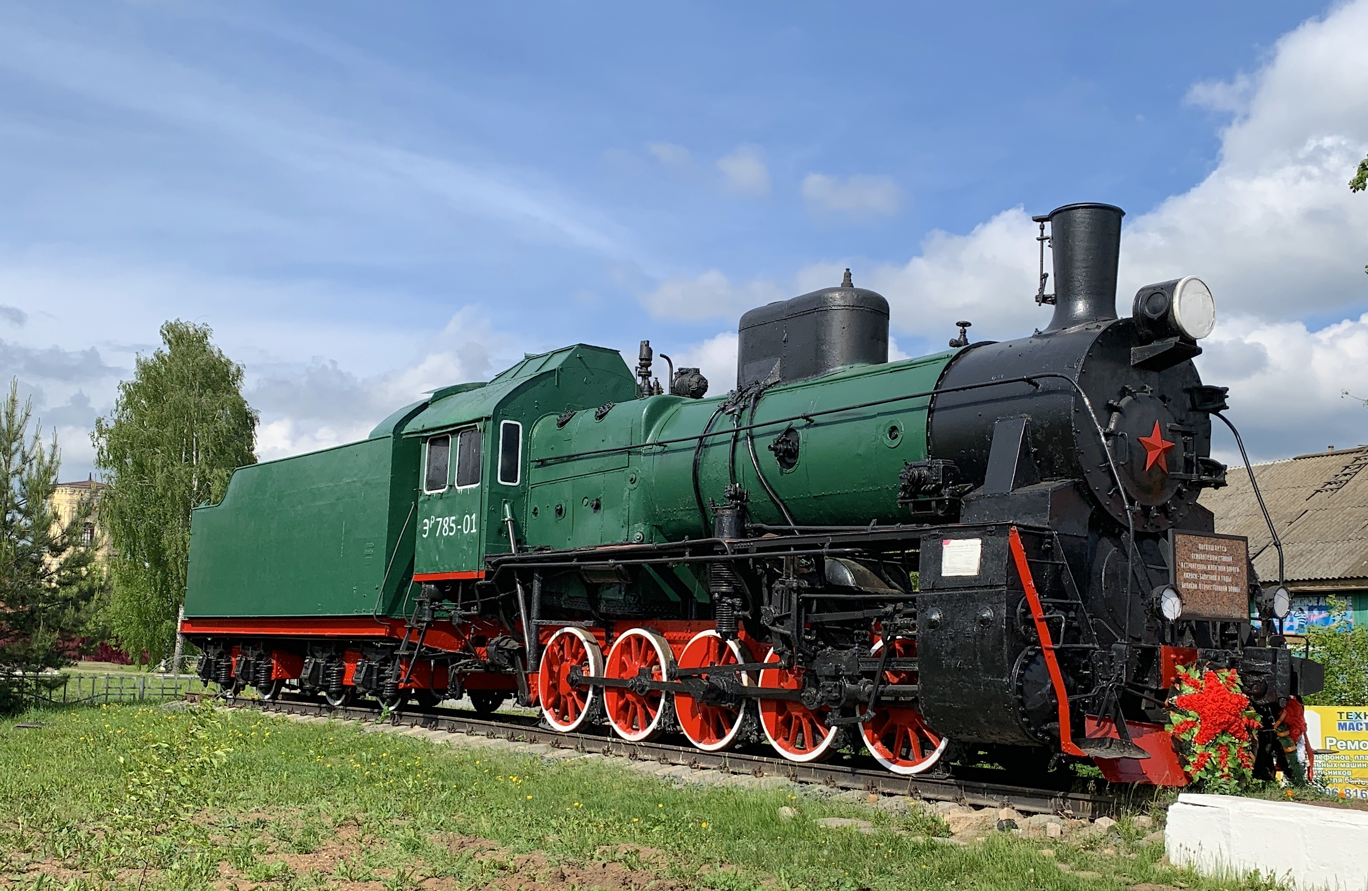 Мемориал строителям железной дороги Пибаньшур-Ижевск на станции Балезино Горьковской ж/д